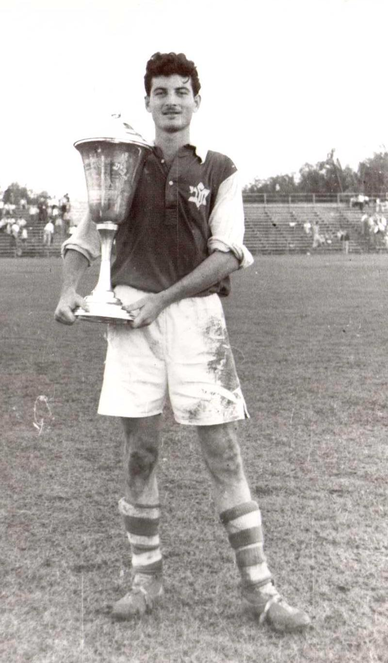 נצחון 3:1 על הפועל פתח תיקווה בגמר גביע המדינה 1957